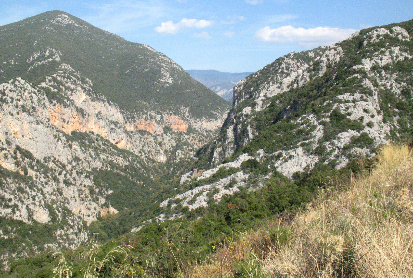 Nedonas Valley